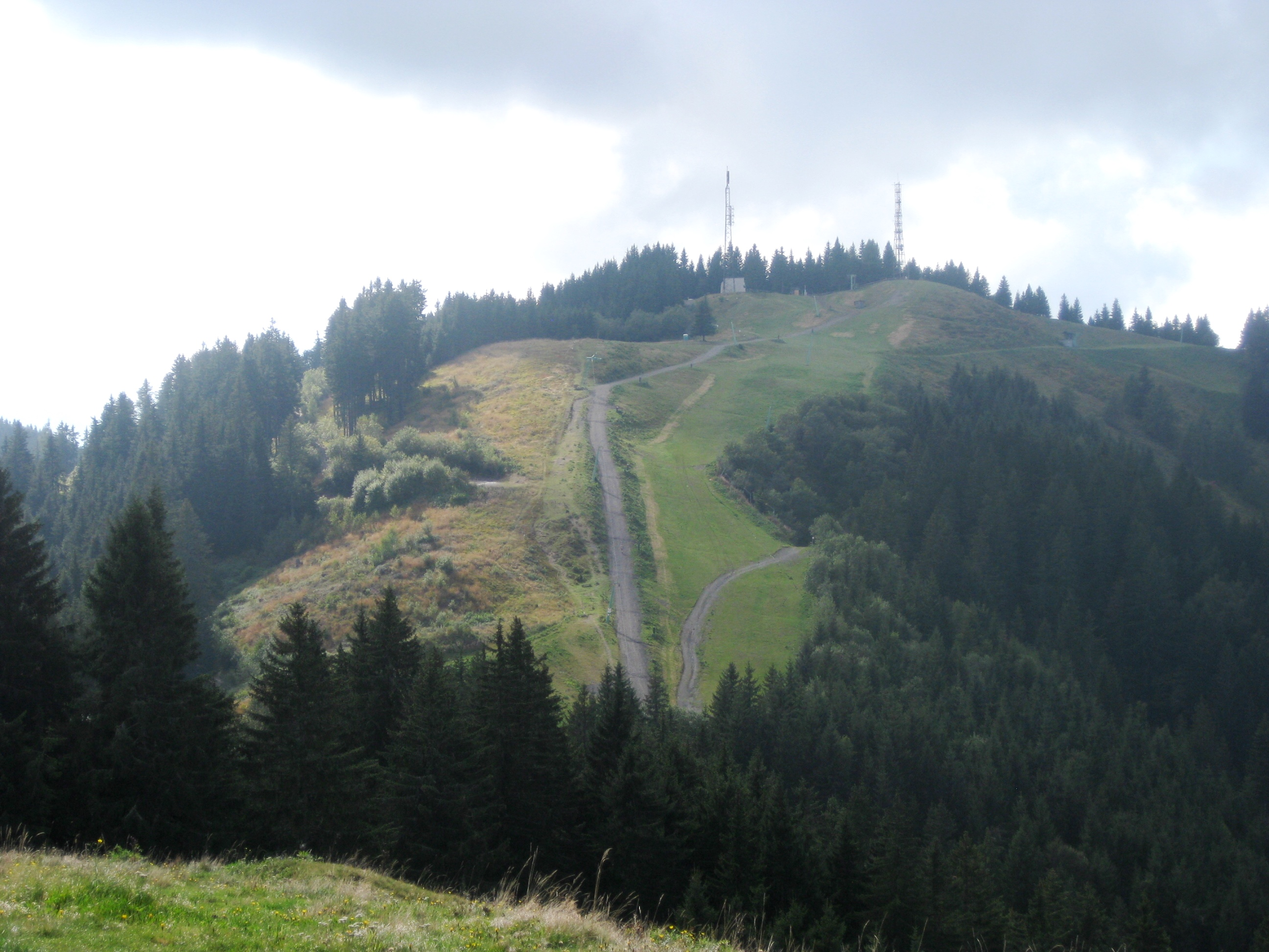 Der Berg Dreiländereck/Monte Forno/Peč in den Karawanken; aufgenommen von der Bergstation der Dreiländereckbahn in Arnoldstein